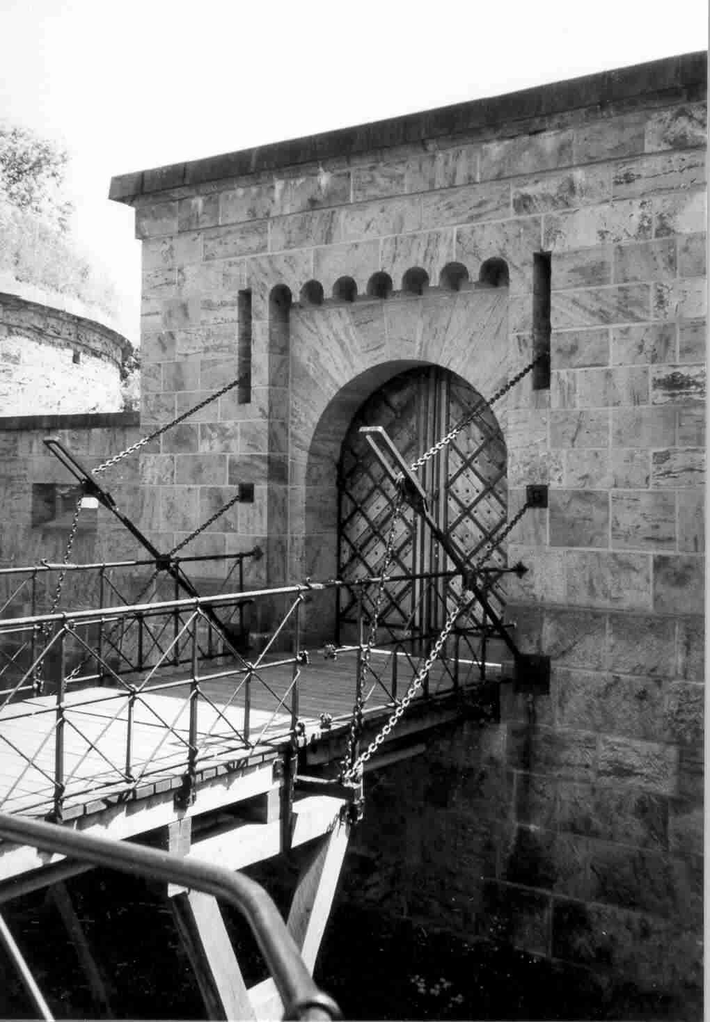 Das Fort C mit Zugbrücke der Festung Minden in Minden, Nordrhein-Westfalen.